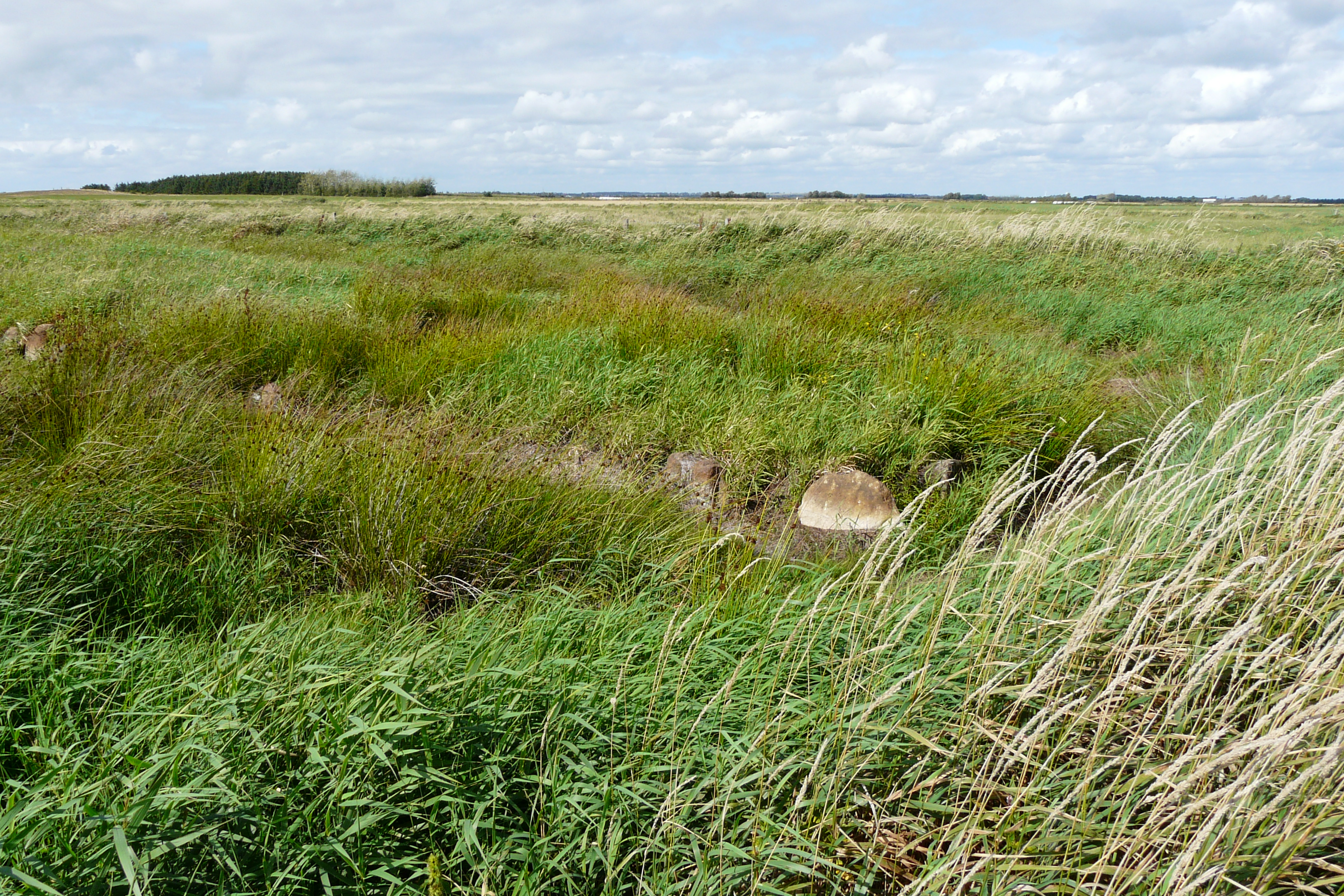 Langdysse ved Abterp 5-6000 gammel